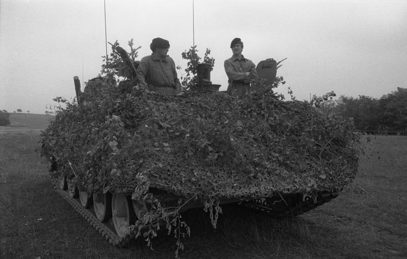 23.9.1986 Mitarbeiter des Bundespresseamtes beobachten das Herbstmanöver "Fränkischer Schild" der Bundeswehr - mit Beteiligung zahlreicher Soldaten aus NATO-Mitgliederstaaten sowie eines französischen Großverbandes - im Raum Würzburg. Information added by Wikimedia users.